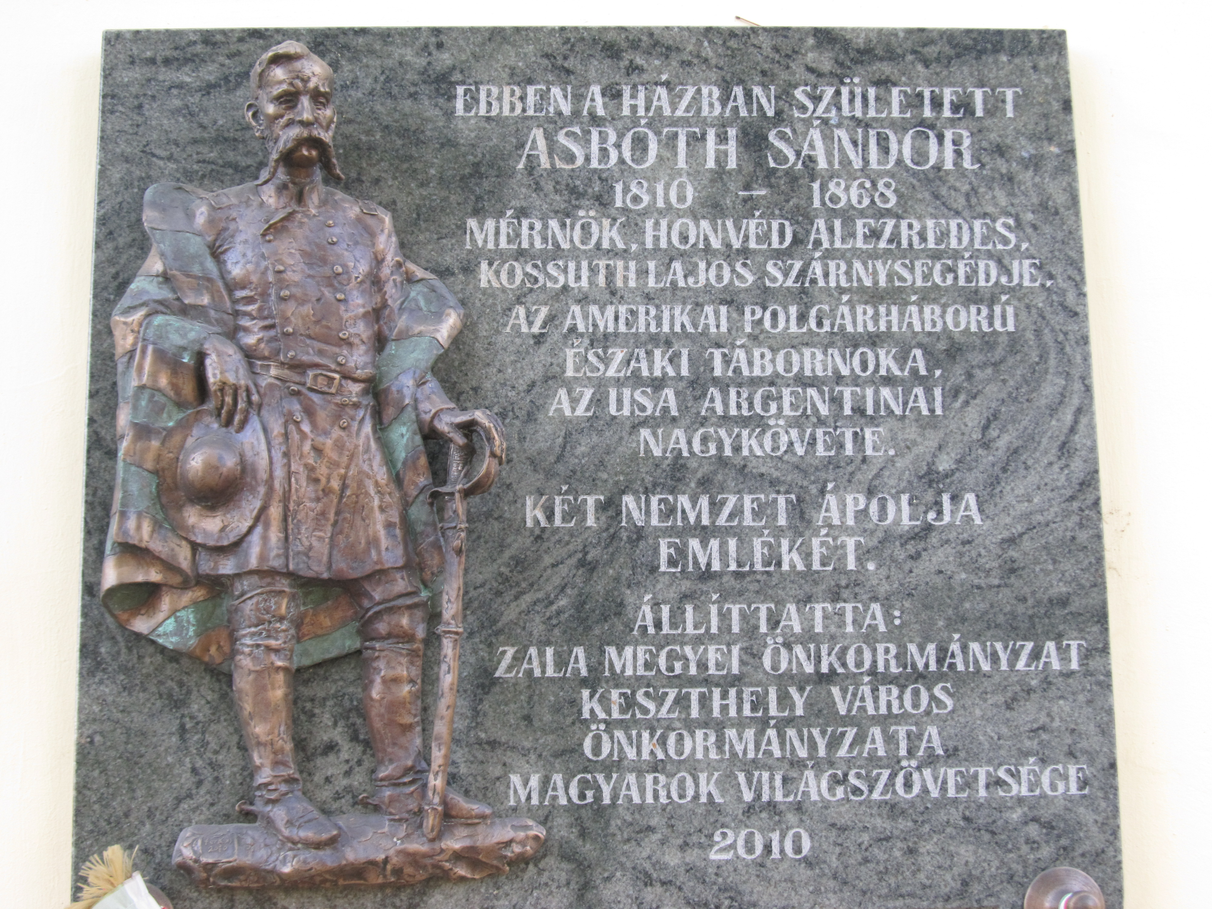 Asbóth Sándor emléktábla a keszthelyi szülőháza falán (Kastély utca 5.). Alkotó: Farkas Ferenc.